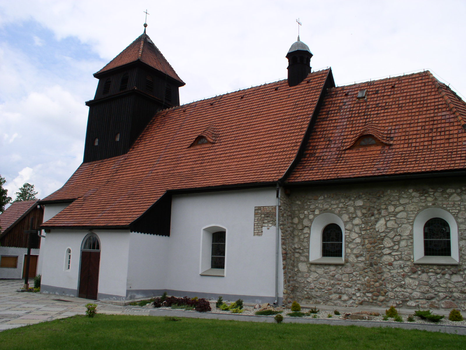 Kozłów,Polska